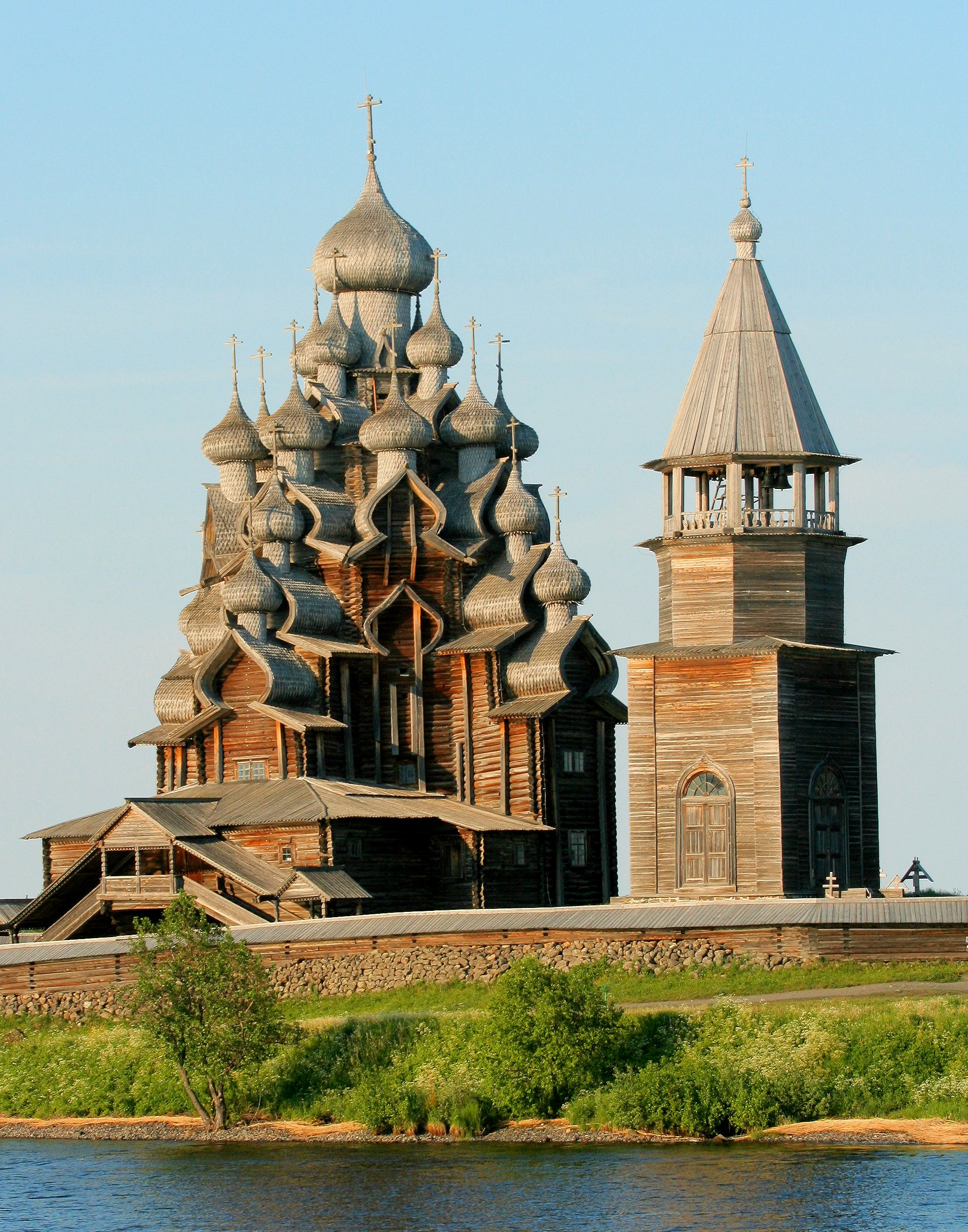 Kizhi wooden miracle